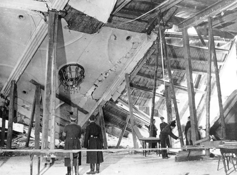 ADN-ZB/Archiv Faschistisches Deutschland 1933-45 Sprengstoffanschlag am 8.11.1939 im Bürgerbräukeller in München, in dem alljährlich die Teilnehmer an den sogenannten "Marsch auf die Feldherrnhalle" am 9.11.1923 ihre Erinnerungsfeier veranstalteten. An diesem Tage verließ Hitler unprogrammgemäß die Veranstaltung zeitiger und entging dadurch dem Anschlag. Die Trümmerstätte nach den ersten Aufräumarbeiten am 9.11. Aufnahme : Wagner